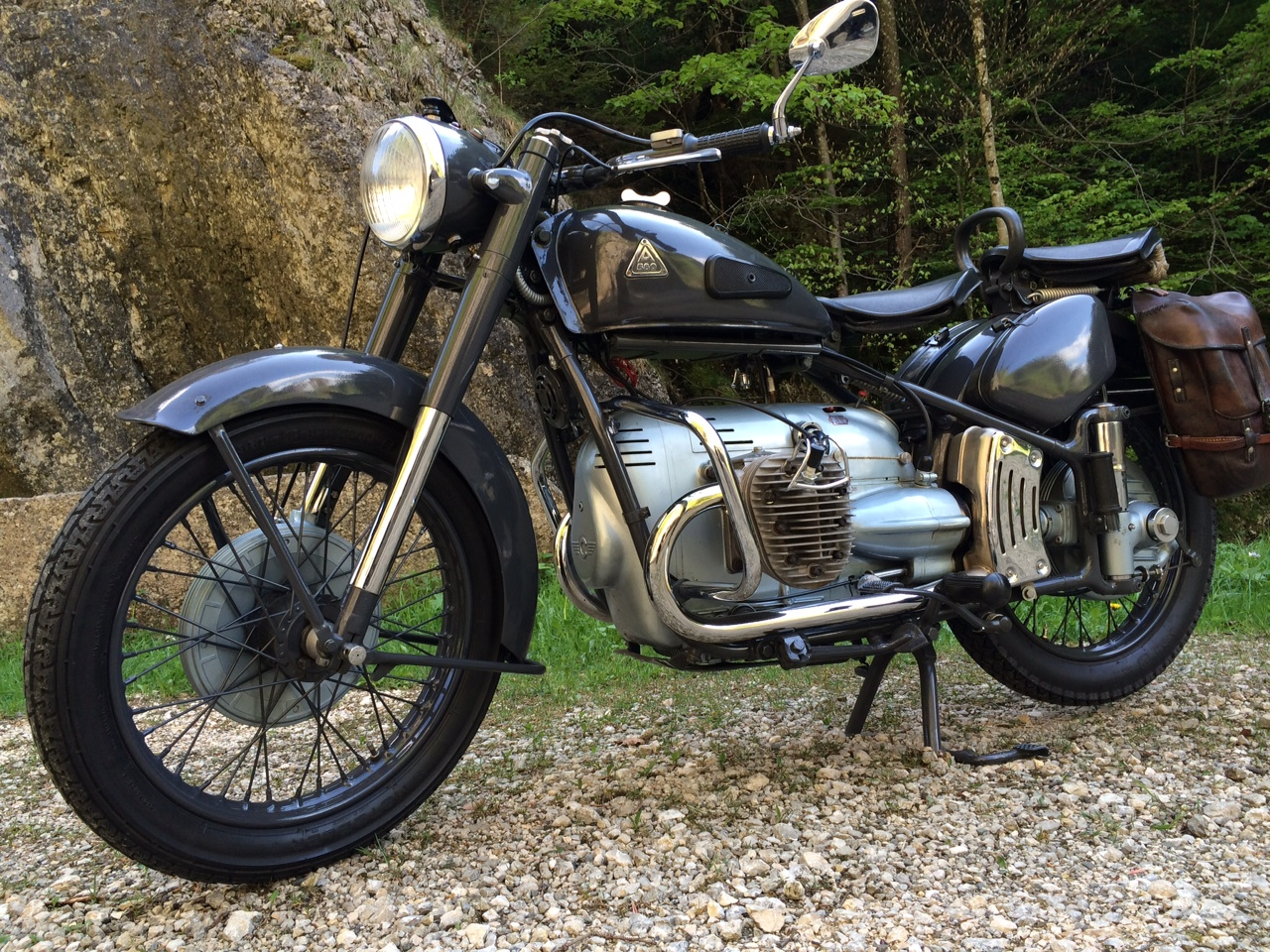 Motorrad Condor A580-1, ohne Gewehrhalter und ohne Tarnscheinwerfer